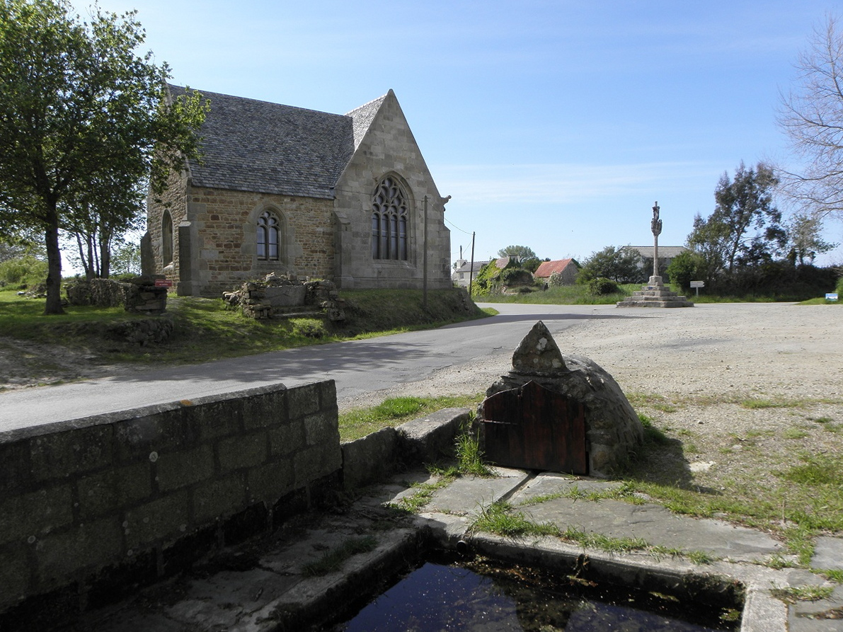 Fontaine, calvaire et chapelle de Christ en Guimaëc (29).